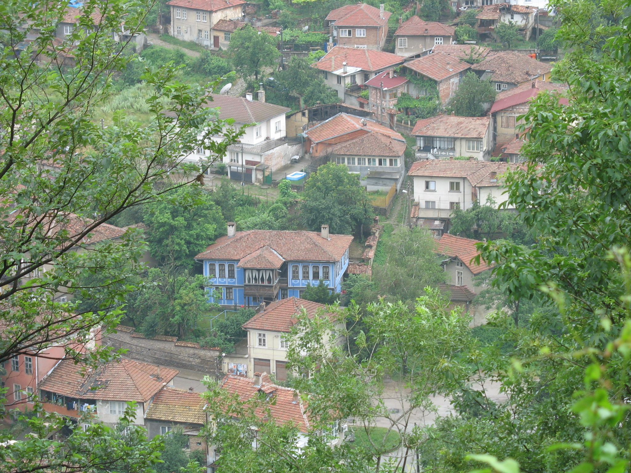 Veliko Tarnovo